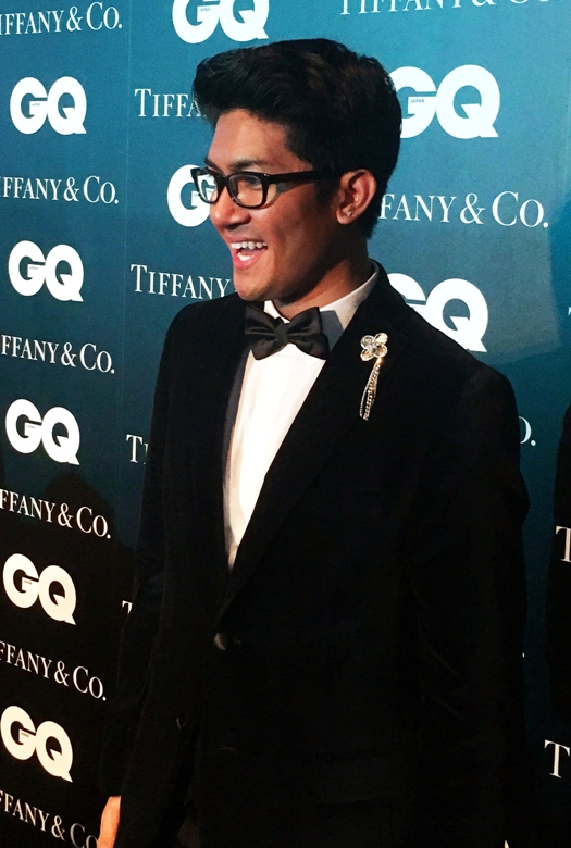 渋谷ザニー氏